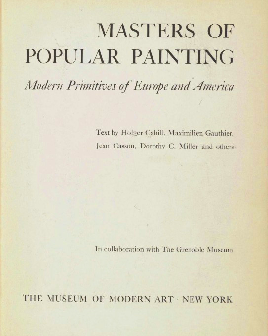 Catalogue de l'exposition Masters of popular painting (titre français : Les maîtres populaires de la réalité), organisée en 1938 par le musée de Grenoble à la demande du MoMA de New-York.